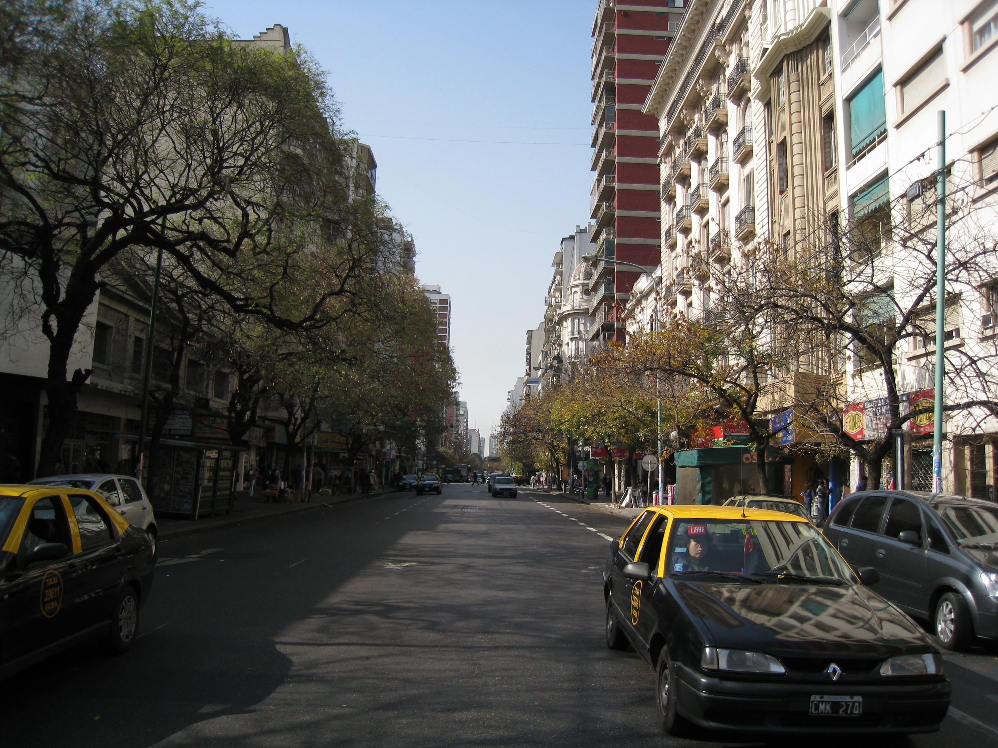 Rivadavia Avenue at Azcuénaga Street, Buenos Aires.